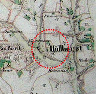 Der Hobrink auf einer Karte von 1837